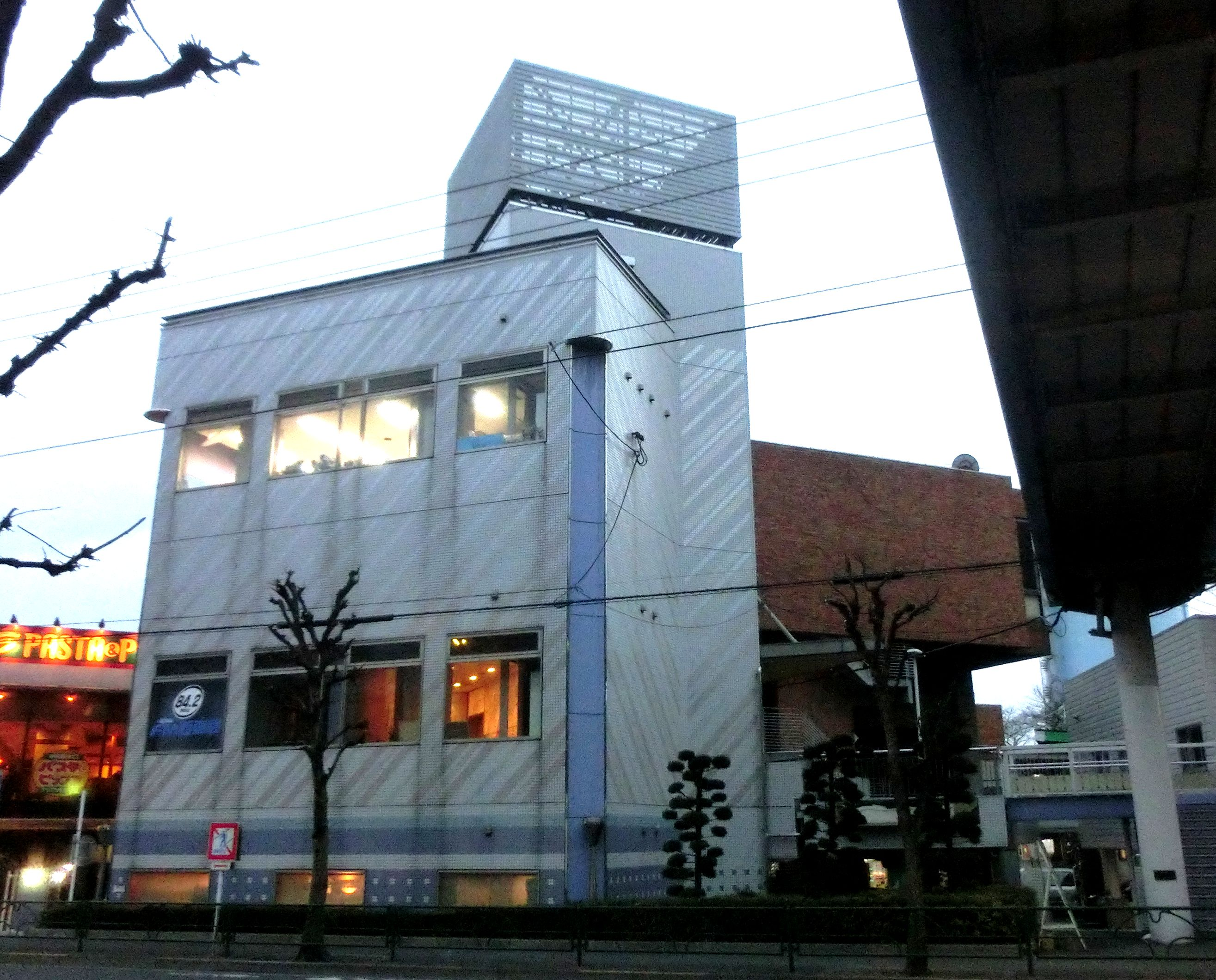 田無ファミリーランド